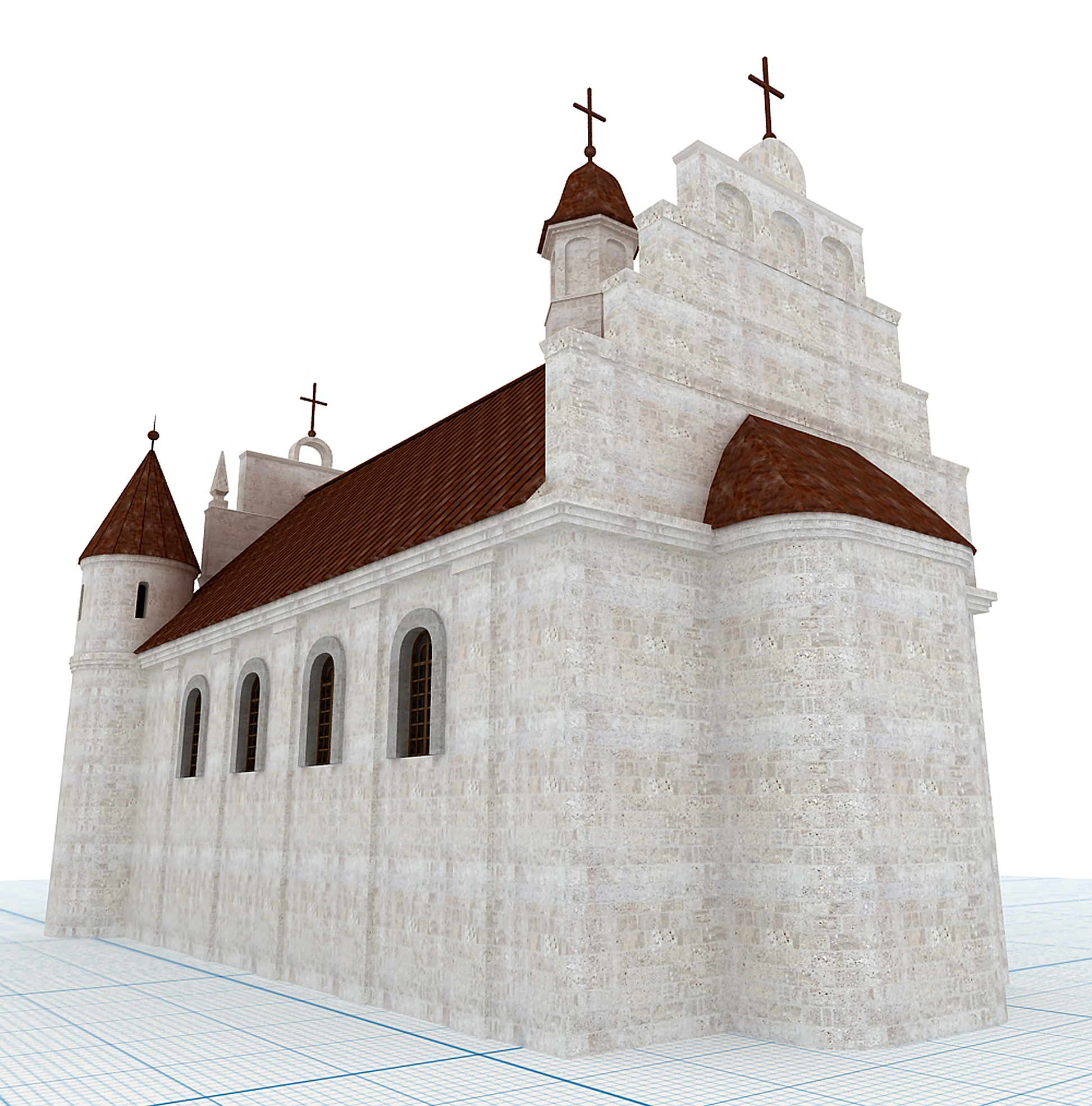 Кафедральний костел Святої Трійці (Луцьк)